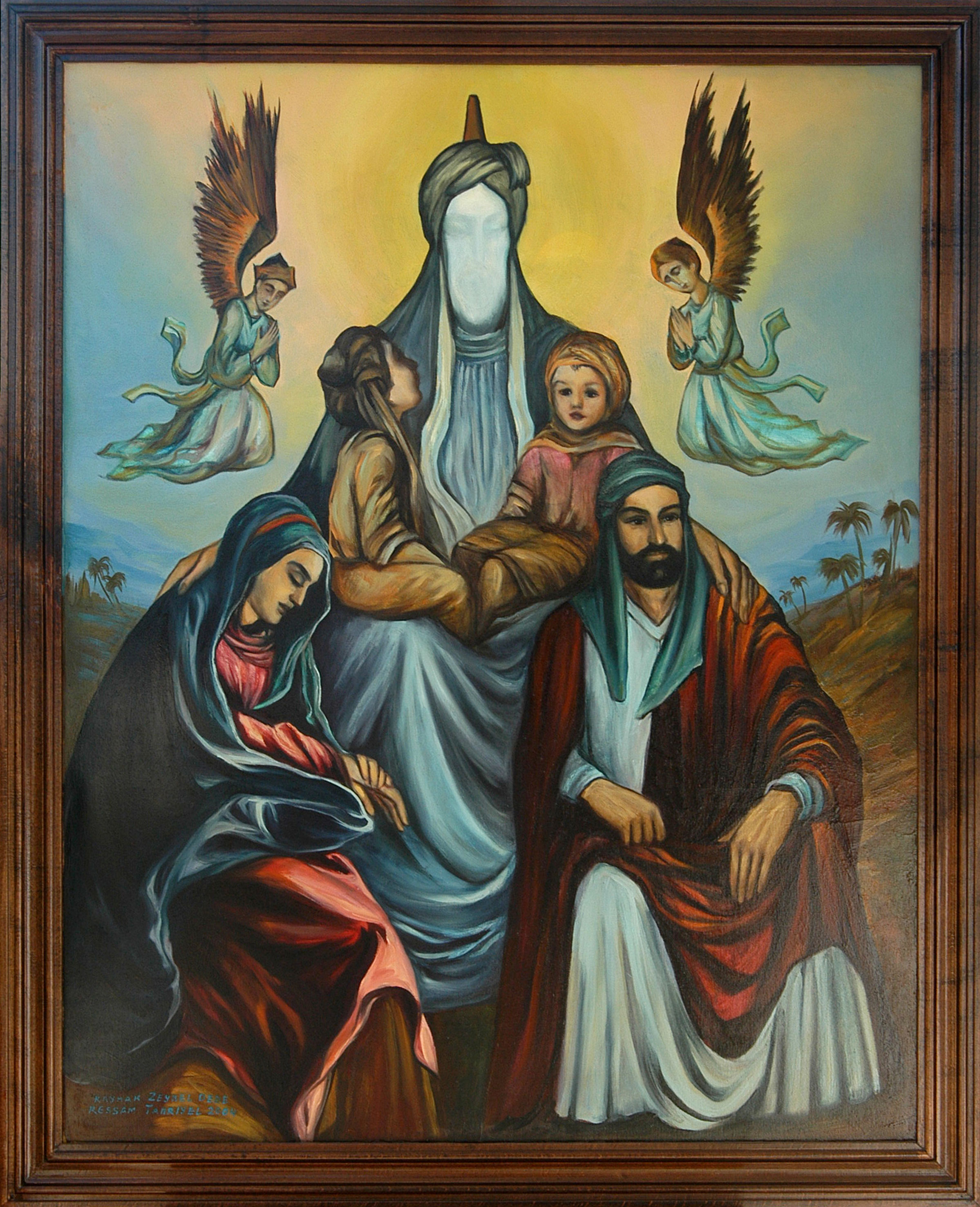 Le prophète avec Ali, Fatima, Hassan et Hussayn